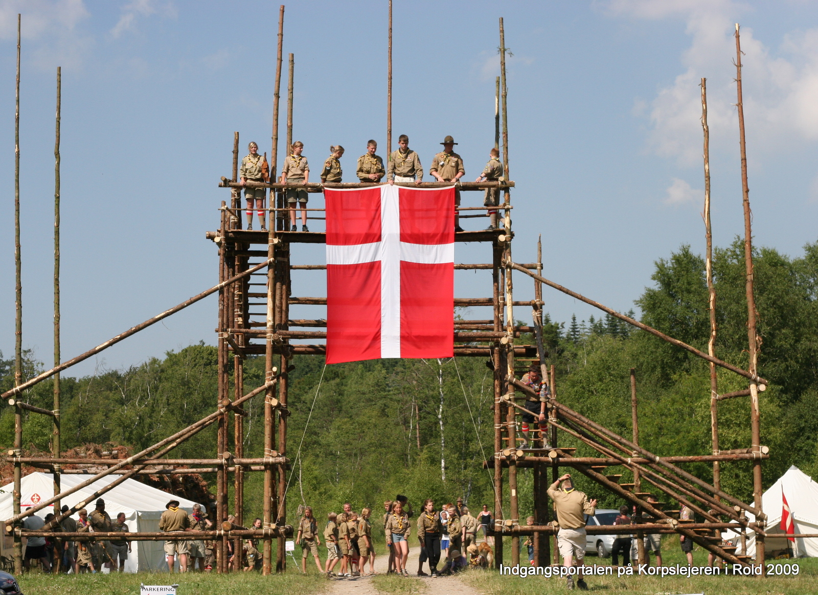 Korpslejeren Rold Skov 2009. foto Jim Michael Daae